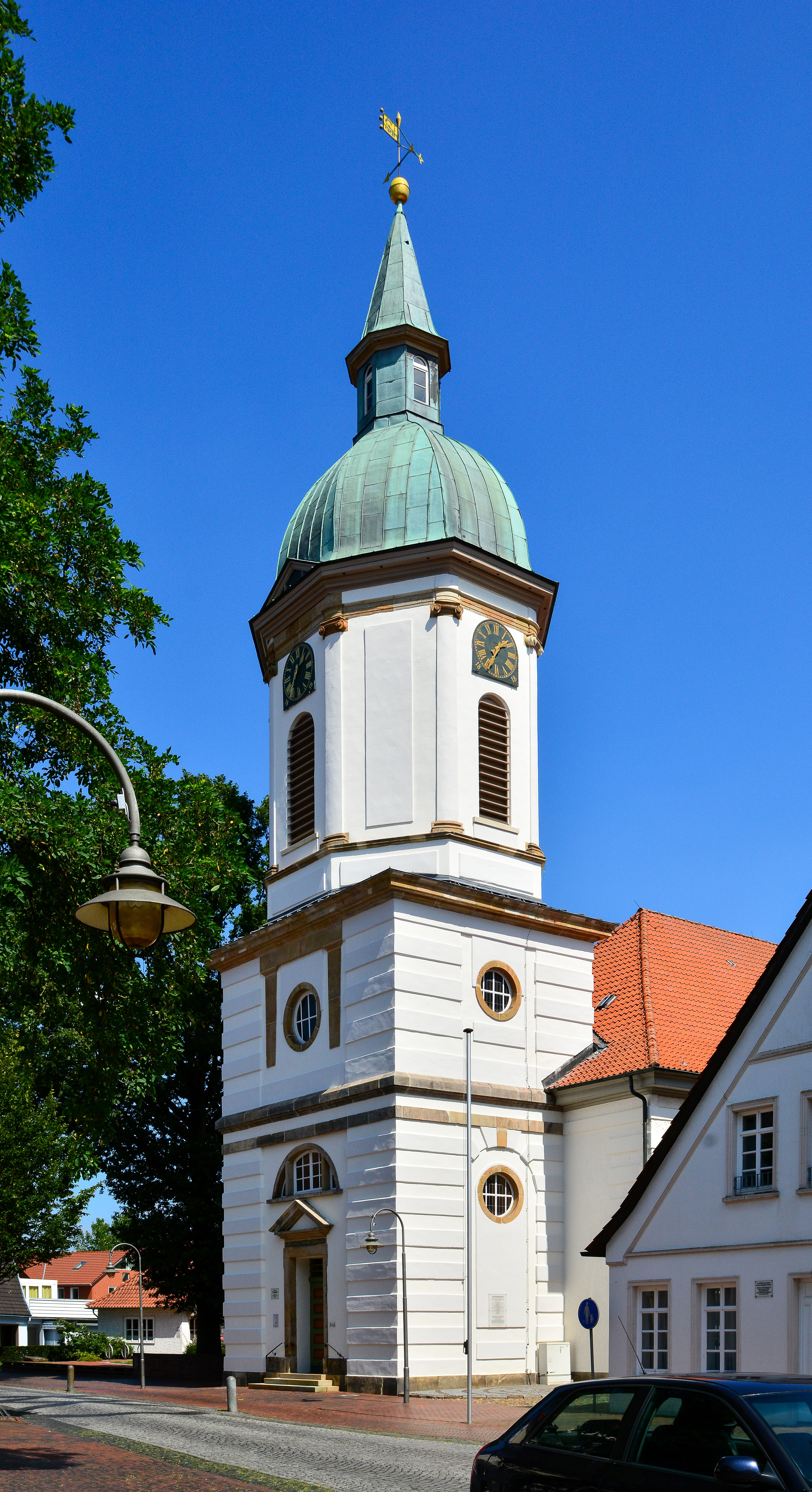 Diepholz, Turm der St. Nicolaikirche